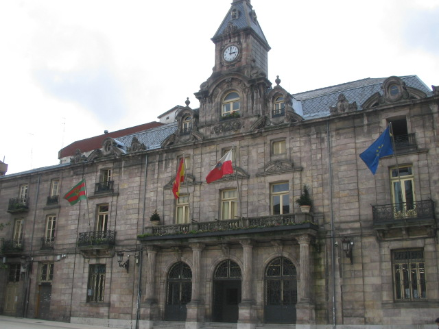 Ayuntamiento de Torrelavega, palacio municipal situado en el Boulevard Demetrio Herreros. Torrelavega's Town Hall